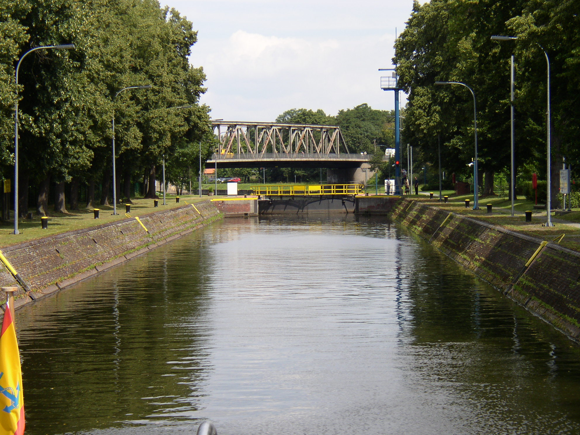 Blick in Richtung Unterhaupt der Hauptschleuse Rathenow (Schleppzugschleuse), Havel